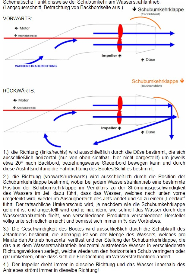 Die Funktionsweise der Schubumkehr am Beispiel eines Wasserstrahl-/Jetantriebes in Wort und Bild.